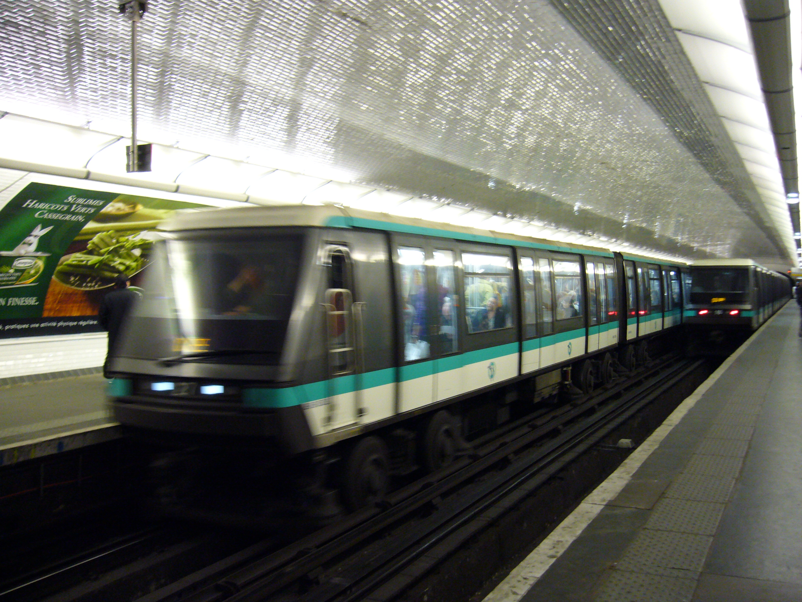 Les quais de la station Reuilly - Diderot sur la ligne 1 du métro de Paris.